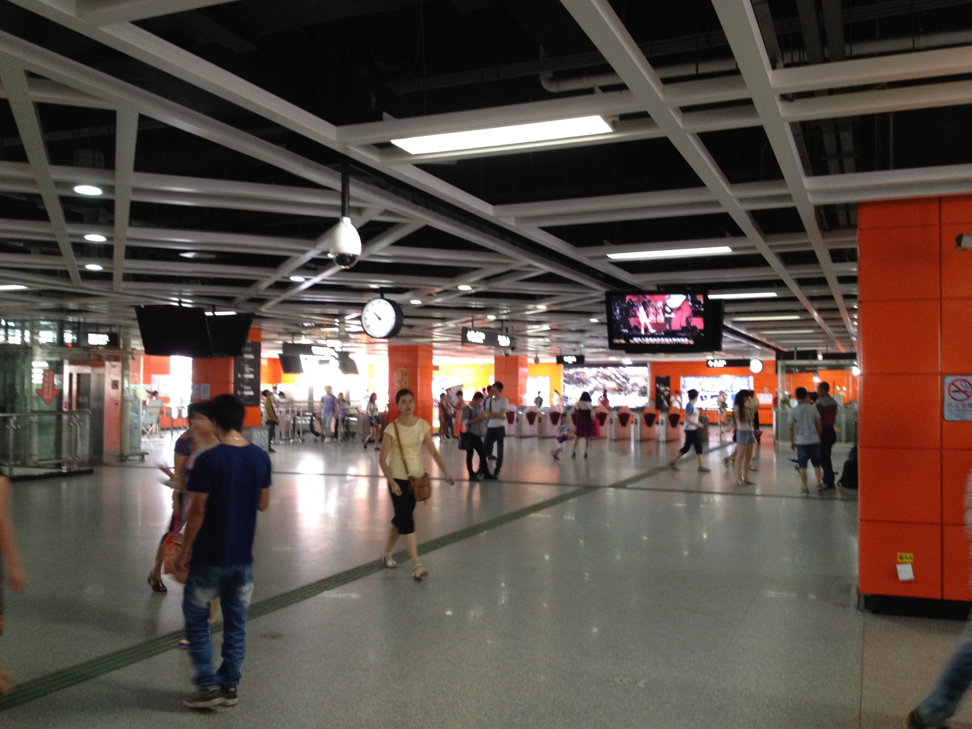 广州地铁嘉禾望岗站站厅